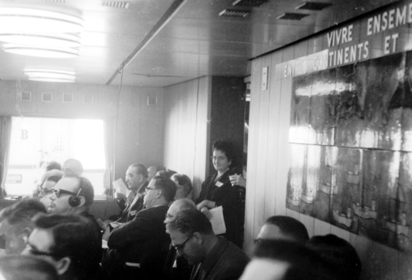 Konferenz Europäischer Kirchen --- Tagung 1964 auf MS Bornholm Tagungsthema auf Wand rechts